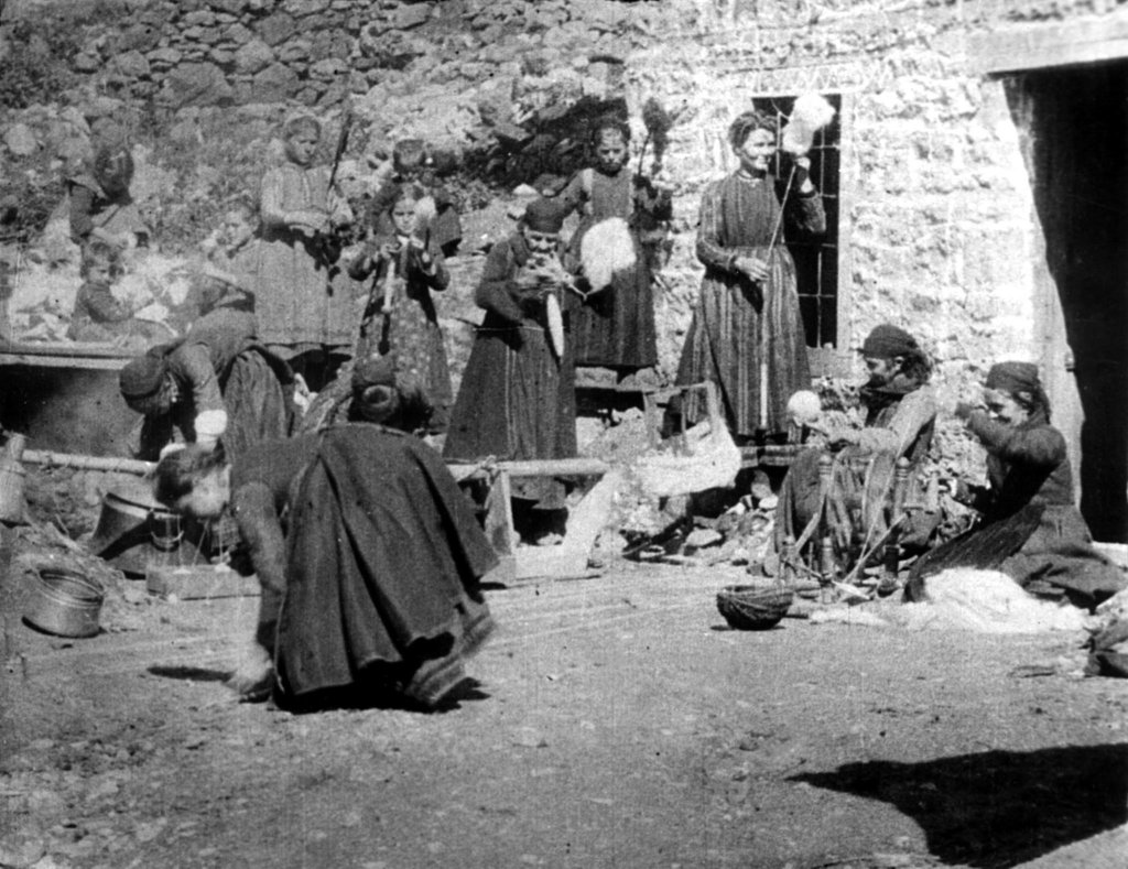 Manaki Kardeşlerin 1905 ya da 1907 yılında çektiği İp Eğiren Kadınlar adlı filmden bir kare.